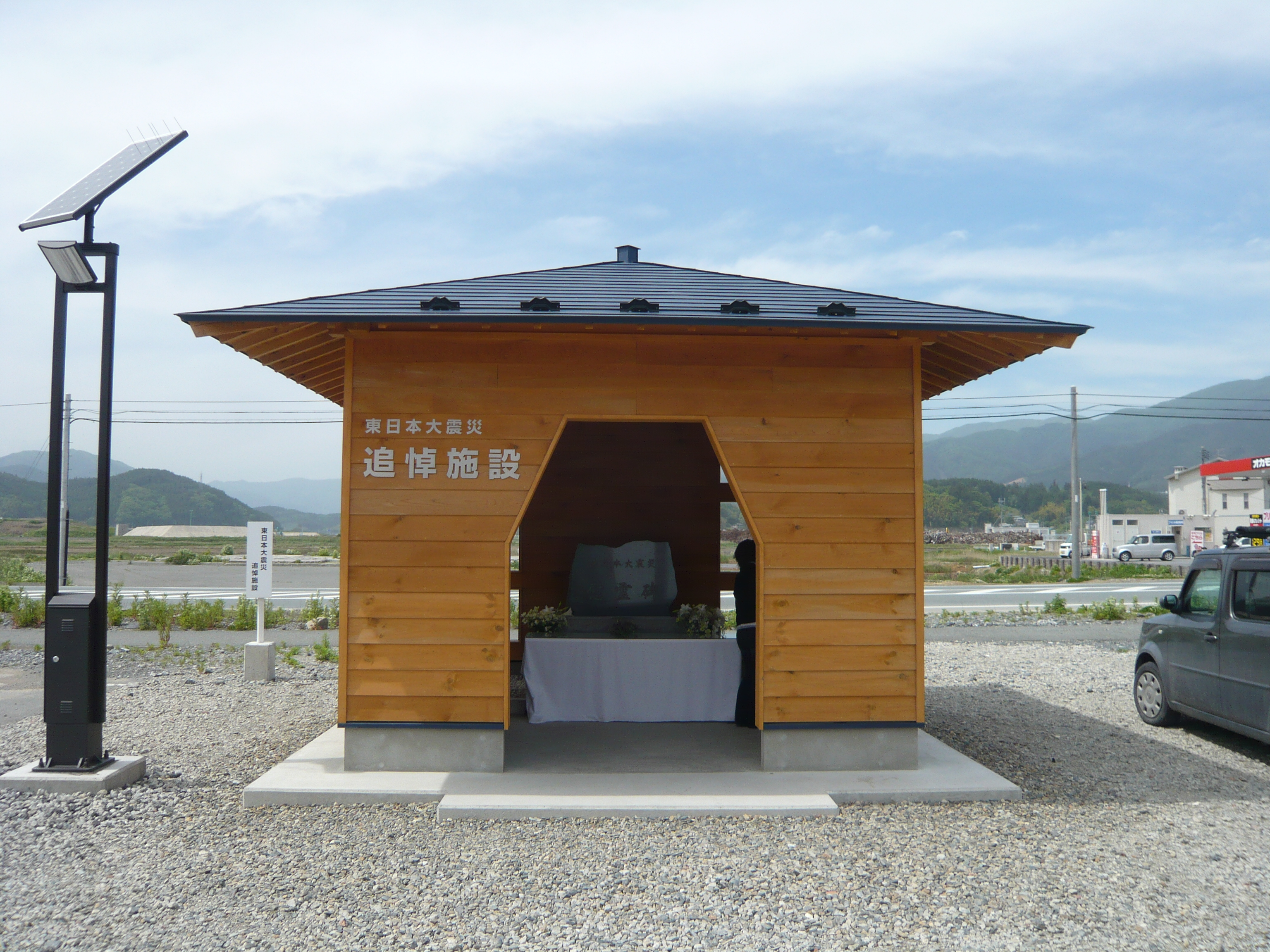 旧陸前高田道の駅にある、大震災被災者追悼施設(2013年6月1日）